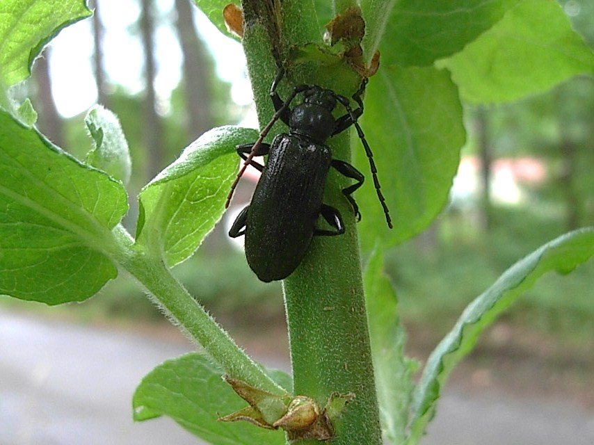 Weibchen des Schwarzes Bergbocks Saphanus piceus bei Lindberg, Bayerischer Wald, Deutschland